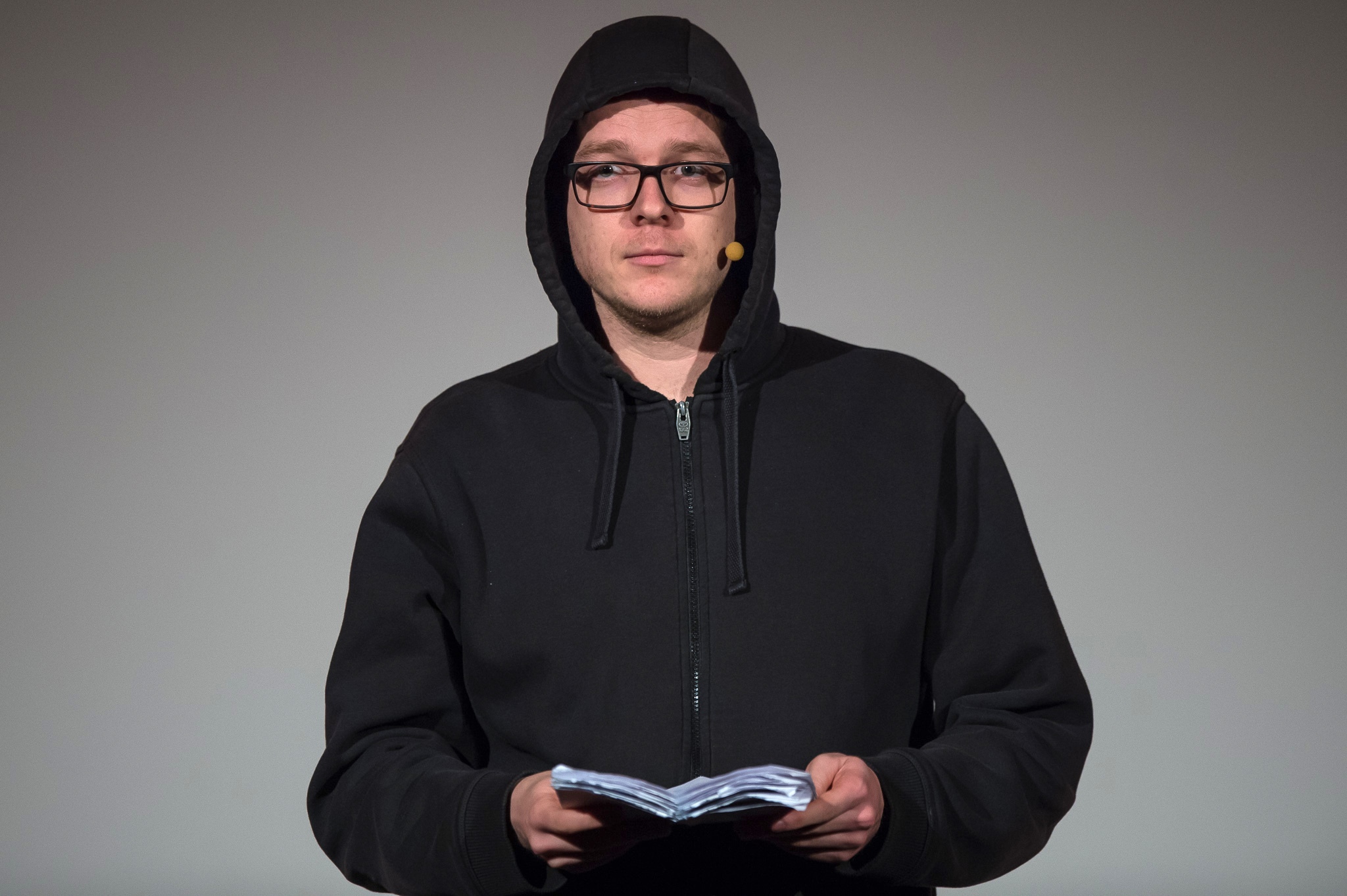 Concertbüro Franken,Gutmann am Dutzendteich,Kabarett,Nico Semsrott,Slam-Poet